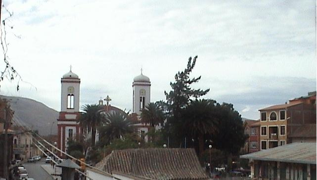 Vista de la Plaza 18 de mayo, desde la calle Sucre.